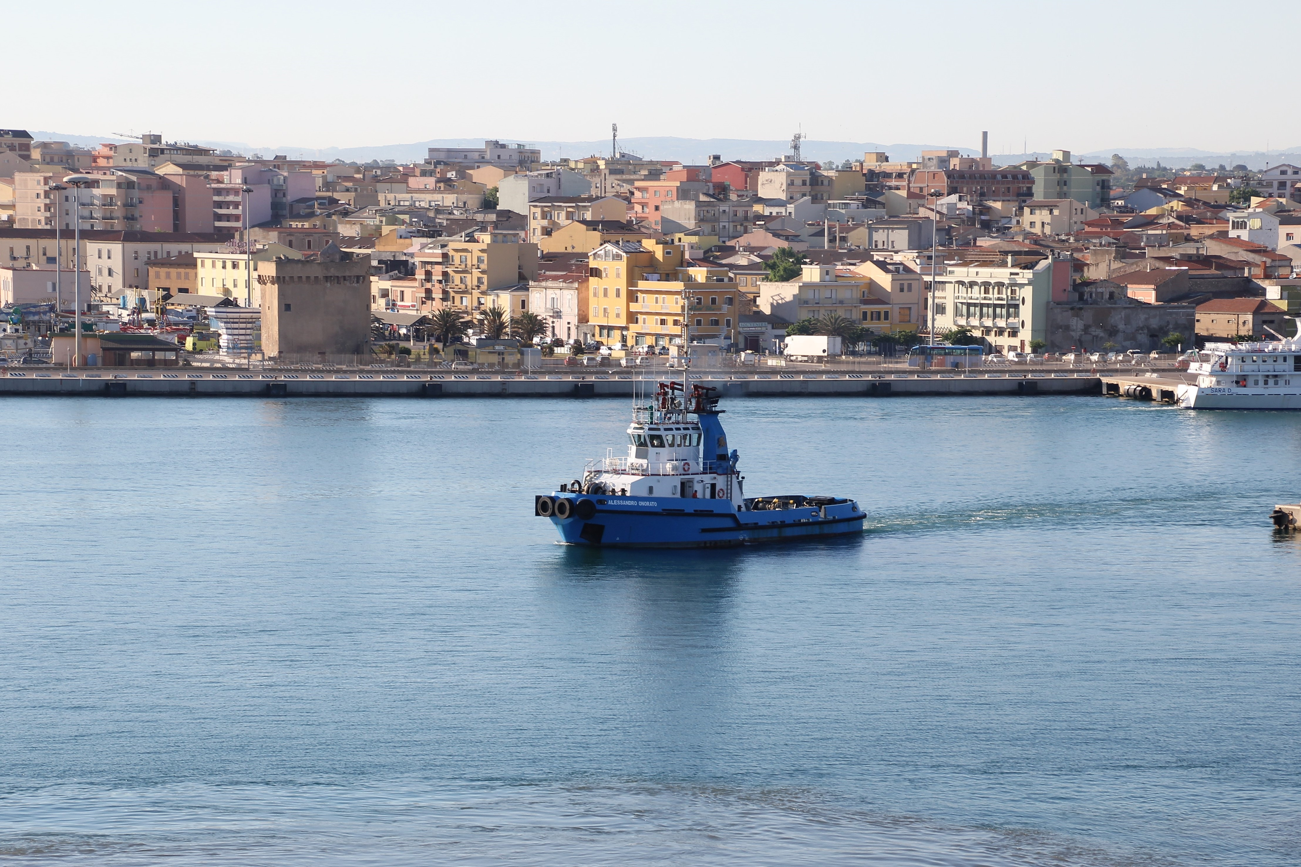 Rimorchiatore Alessandro Onorato